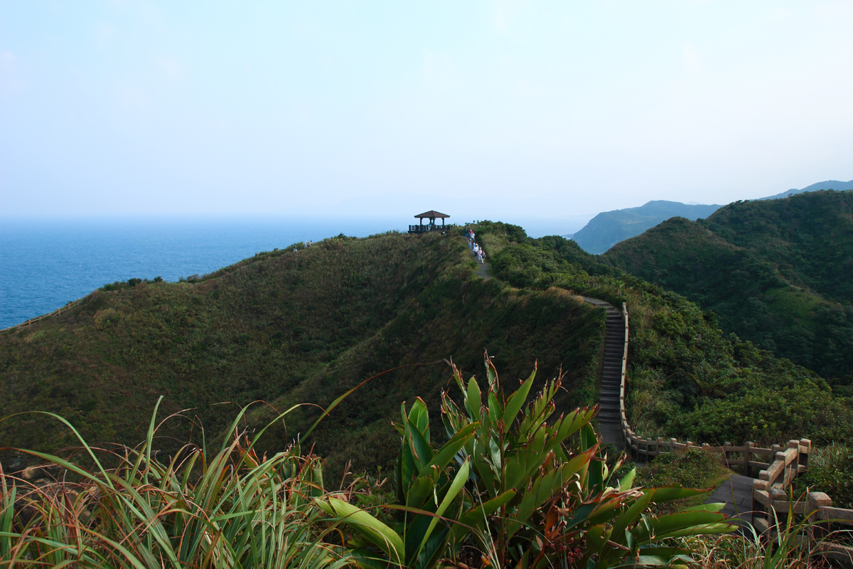 BiTou Cape (鼻頭角)